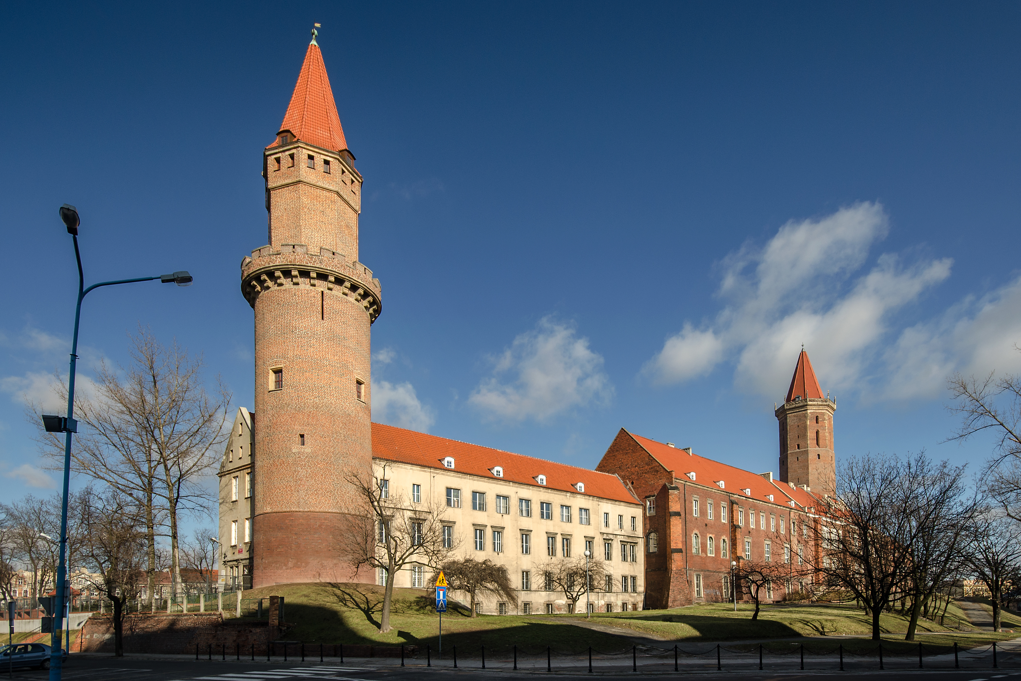 Legnica, zamek piastowski, XIII, XIX